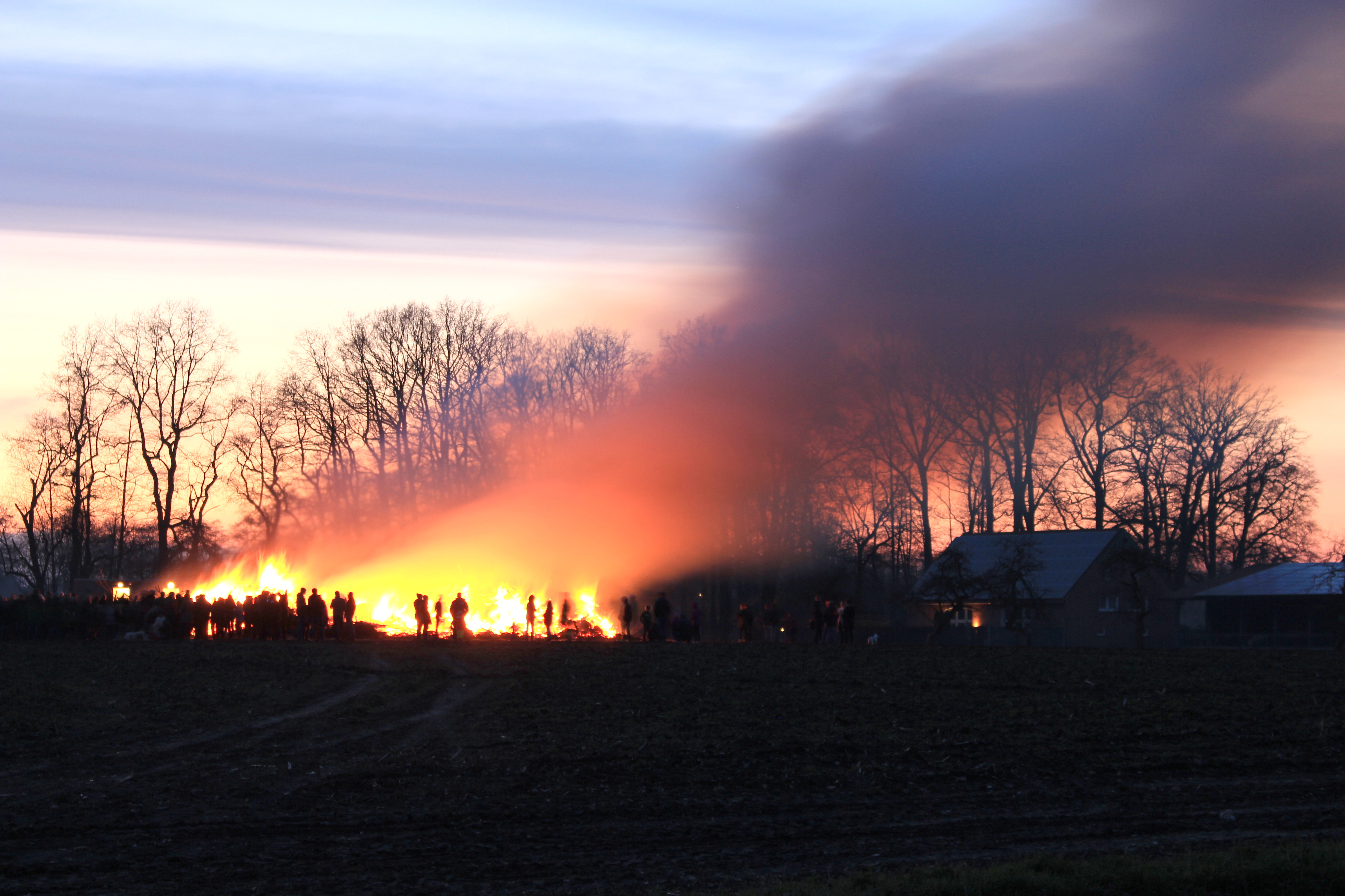 offizielles Osterfeuer 2016 von Verl (Langzeitbelichtung)